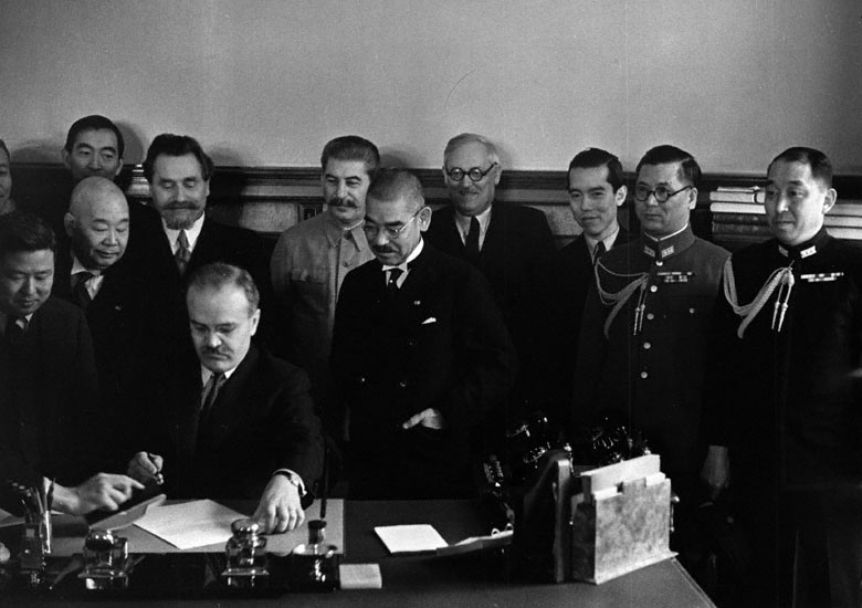 Нарком иностранных дел СССР В. Молотов подписывает Пакт о нейтралитете между СССР и Японией (1941). Присутствуют: И.В.Сталин, министр иностранных дел Японии И.Мацуока, зам. наркома иностранных дел СССР С.А.Лозовский, А.Я.Вышинский.